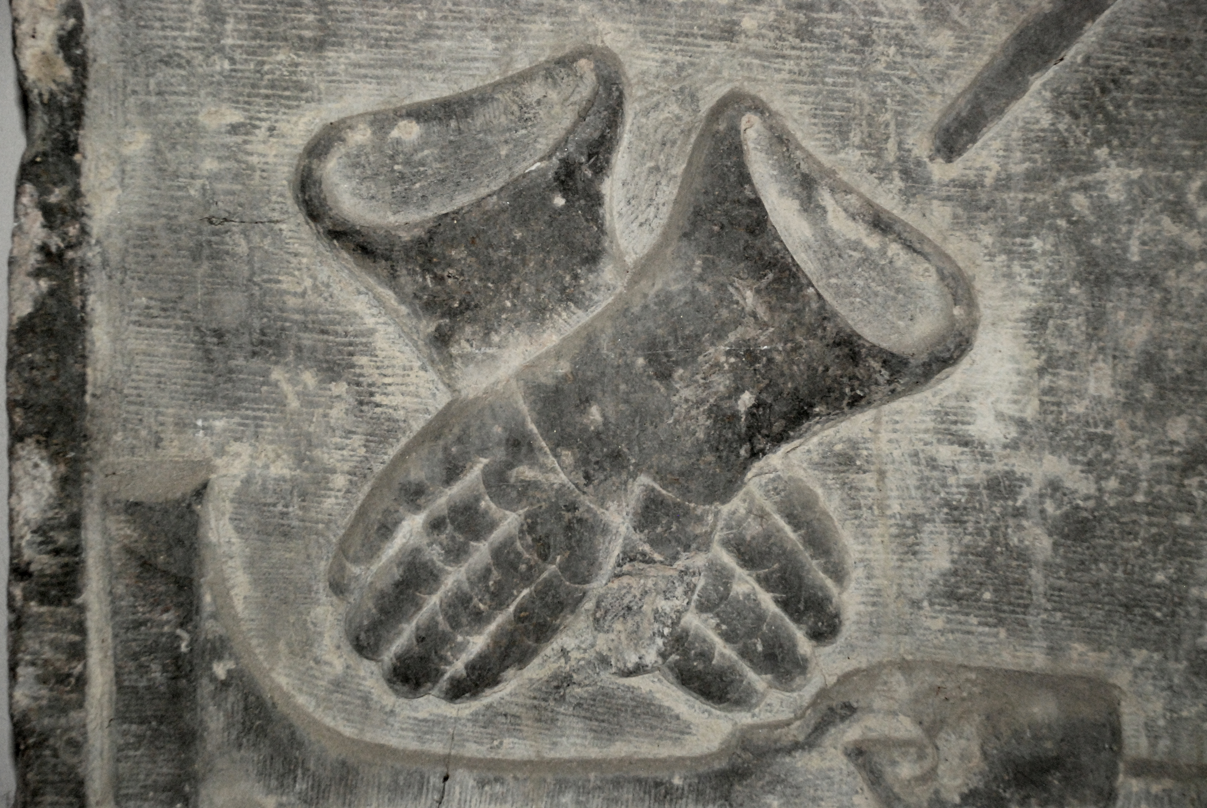 Belgique - Brabant wallon - Ways - Dalle funéraire de Philippe de Baisy